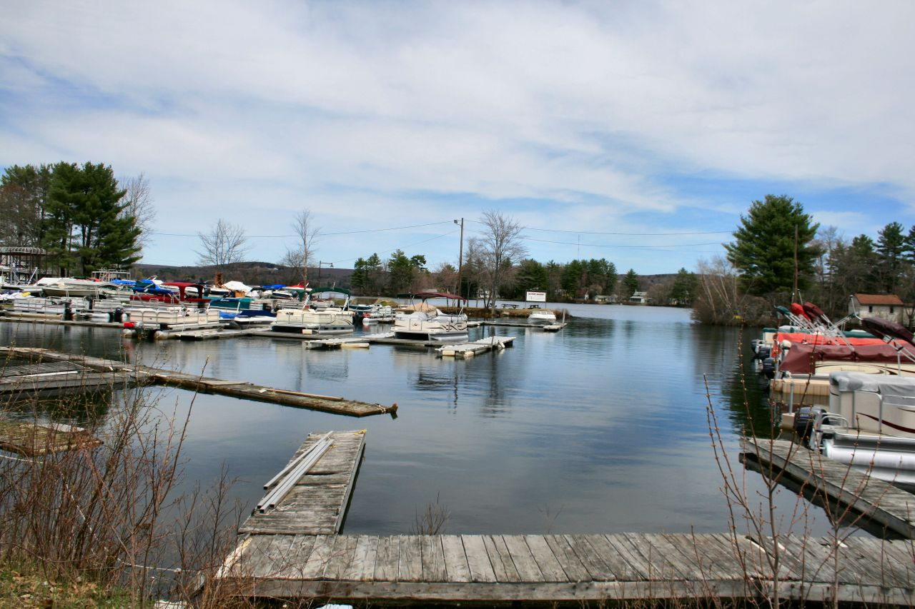 Lake Chaubunagungamaugg boats